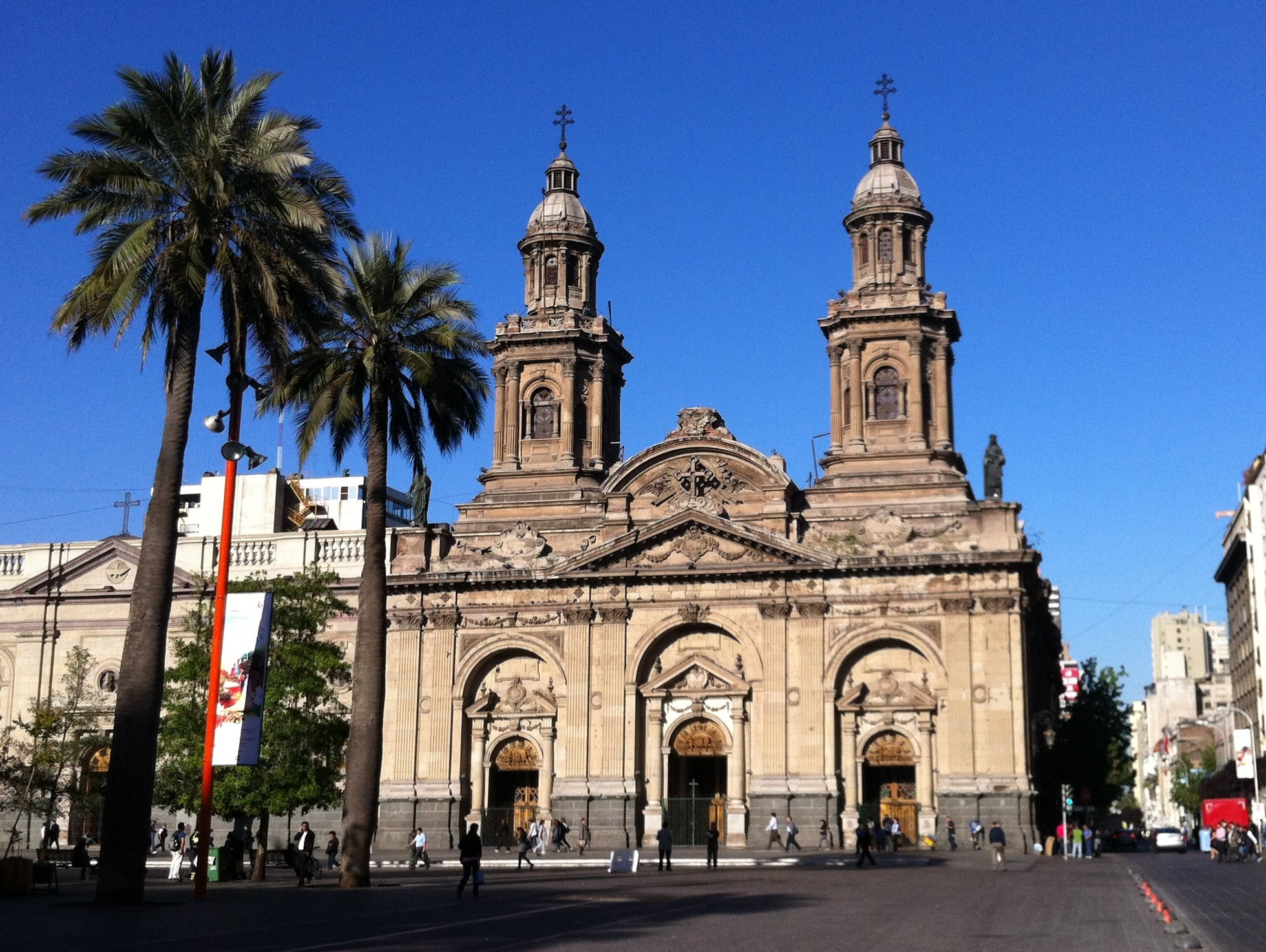 Vista a la Catedral de Santiago desde el oriente de la Plaza de Armas. This is a photo of a national monument in Chile: 210